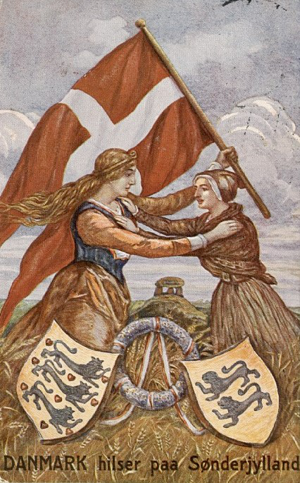 Postkort fra 1920